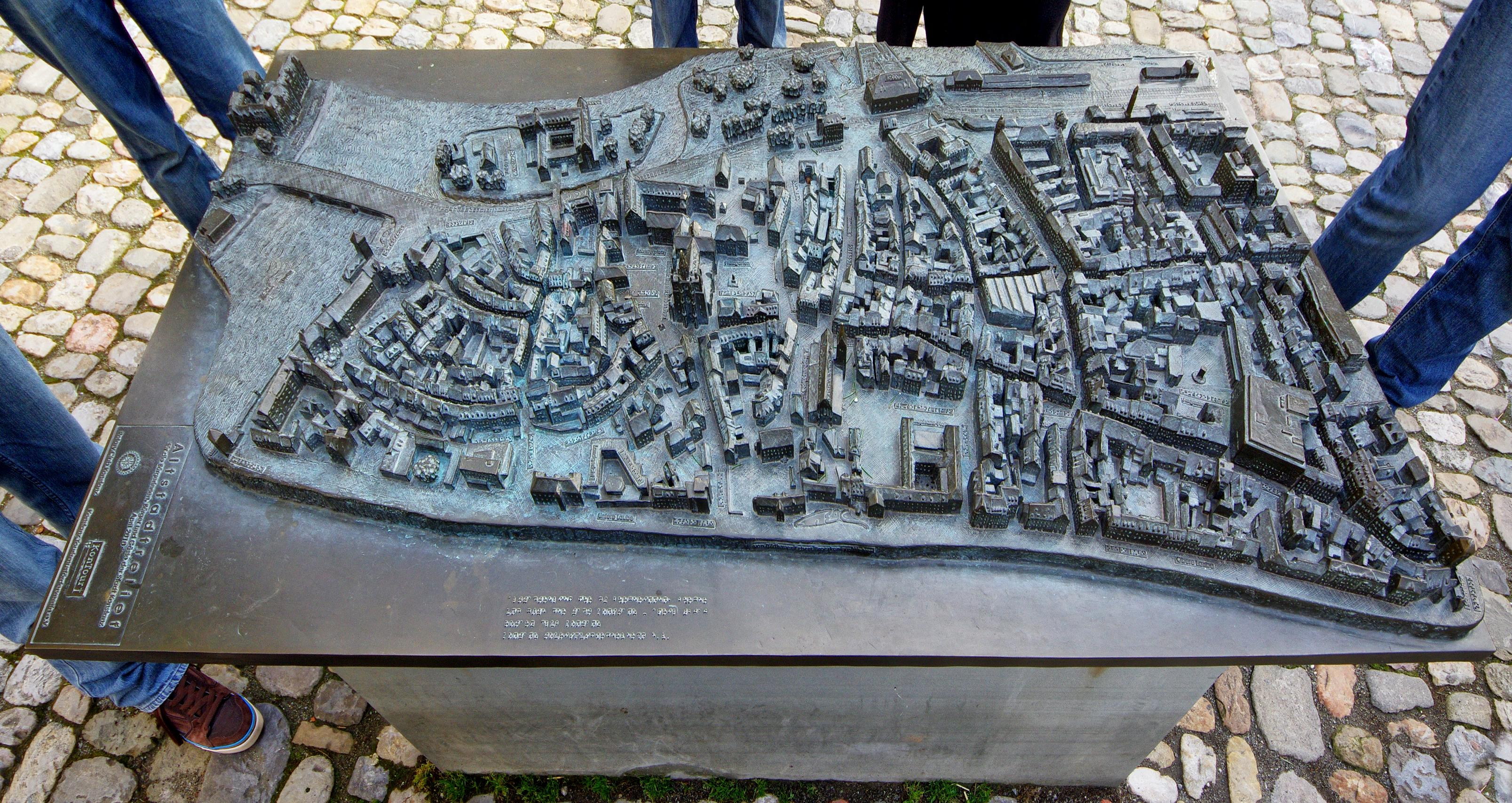 Bronzetafel mit einem Relief der Instadt von Konstanz Die Texte sind normal und in Blindenschrift auf der Tafel angebracht.